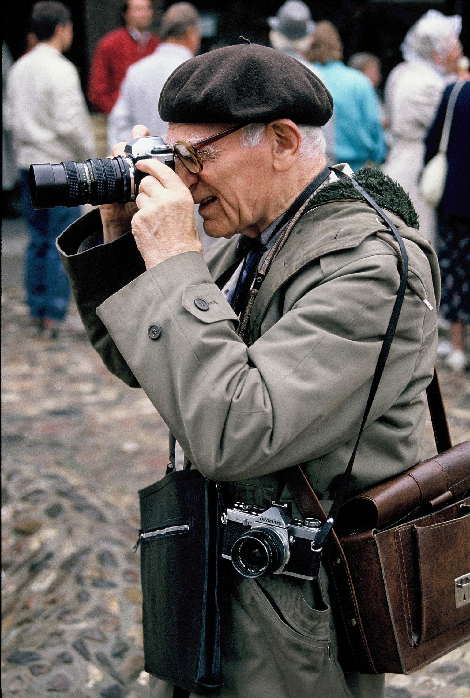 Fotograf Ignaz Böckenhoff, Raesfeld